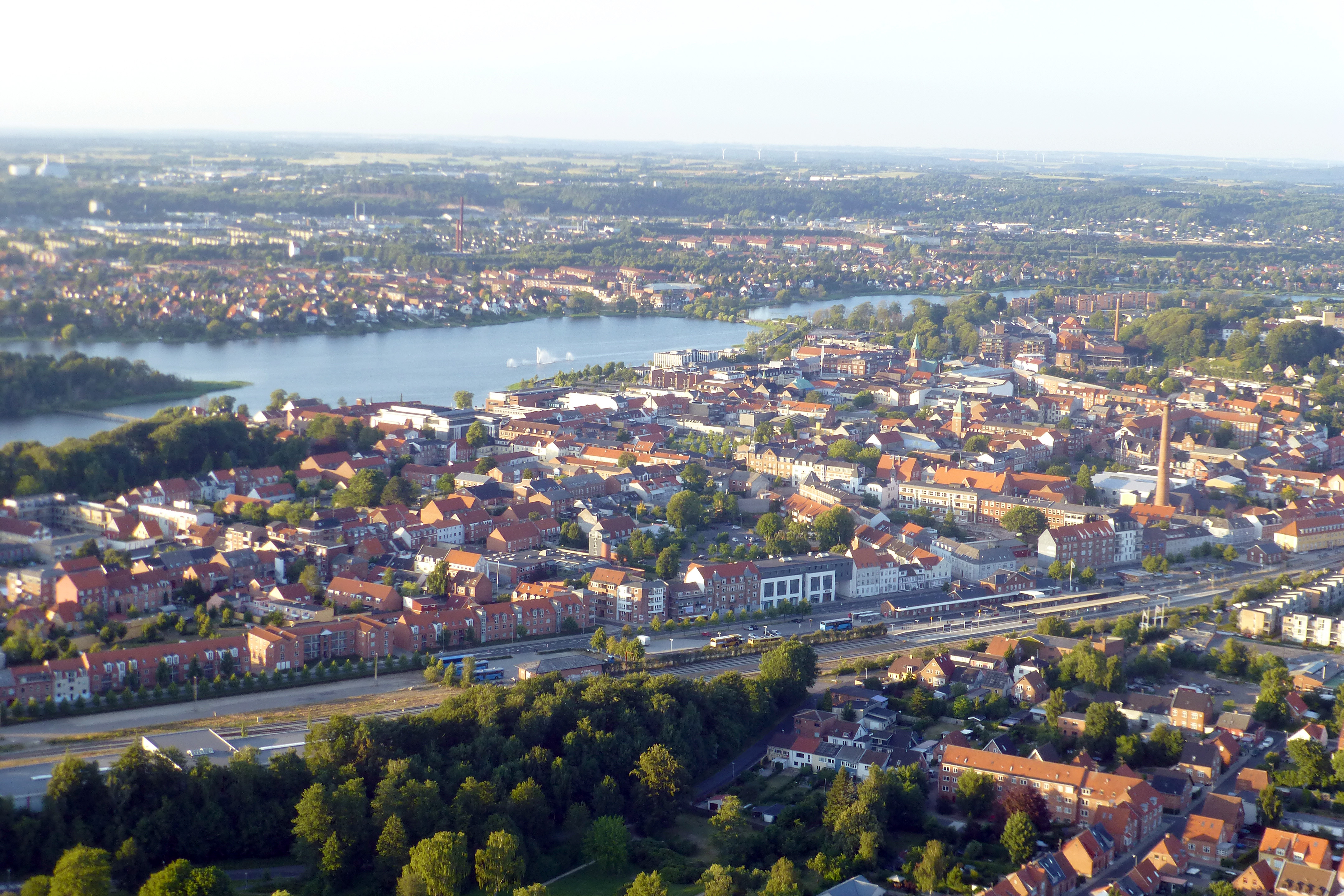 Silkeborg station og Silkeborg Langsø